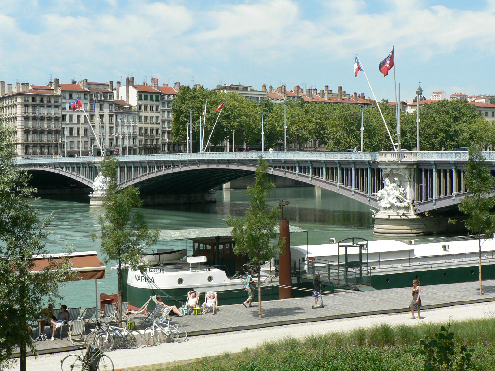 Ponts de Lyon – Pont Lafayette